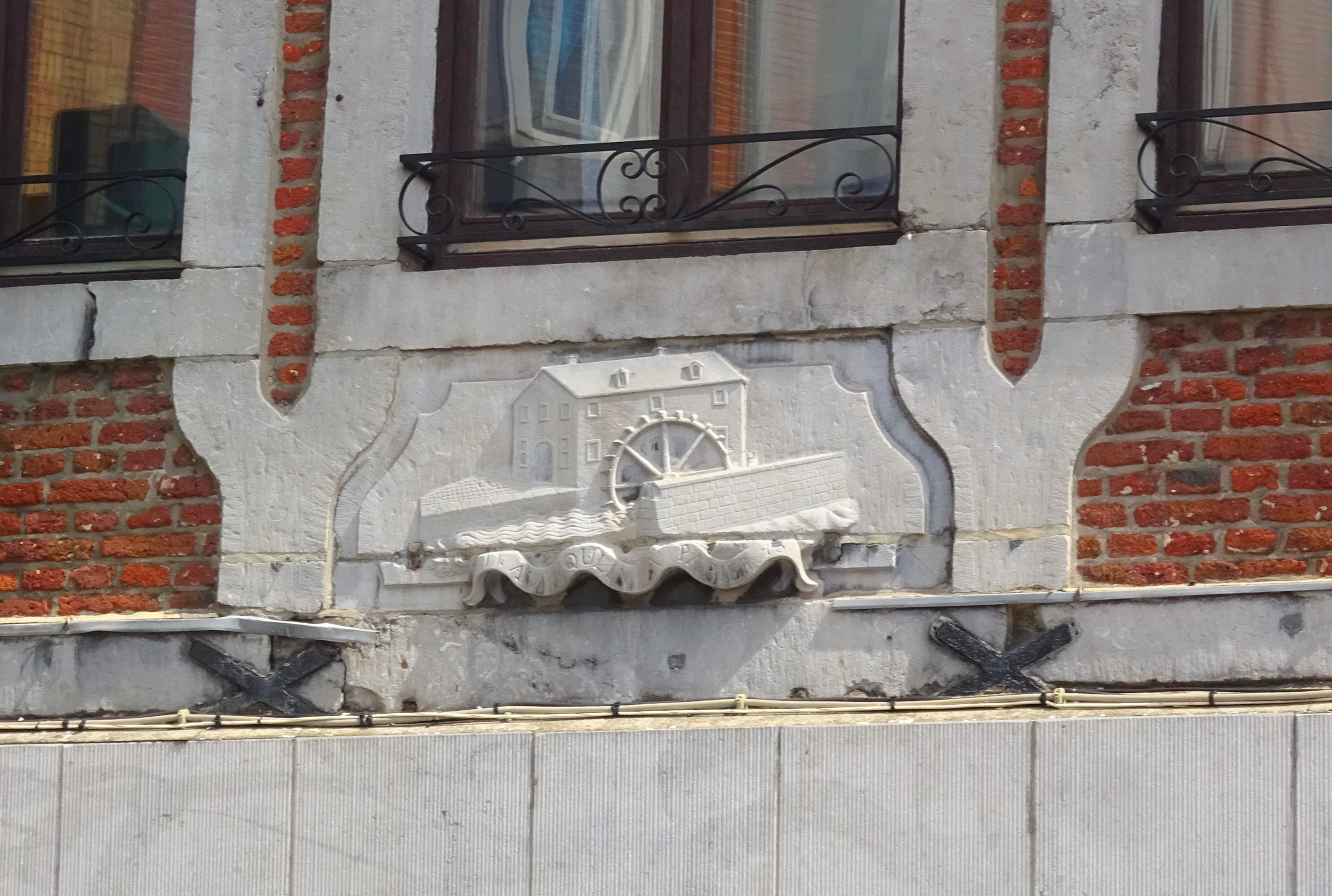 Place Théodore Gobert, 1 : enseigne en pierre sculptée Au moulin à papier 1743